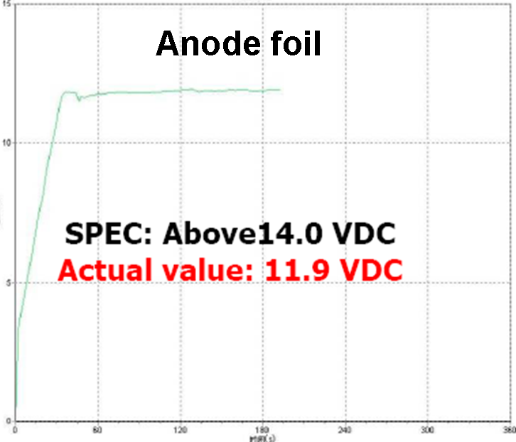 Messkurve der Messung der Anodenspannungsfestigkeit eines ausgefallenen Elkos